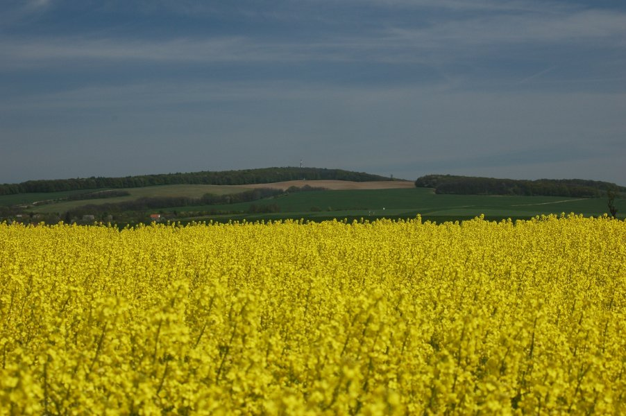 Zámčisko